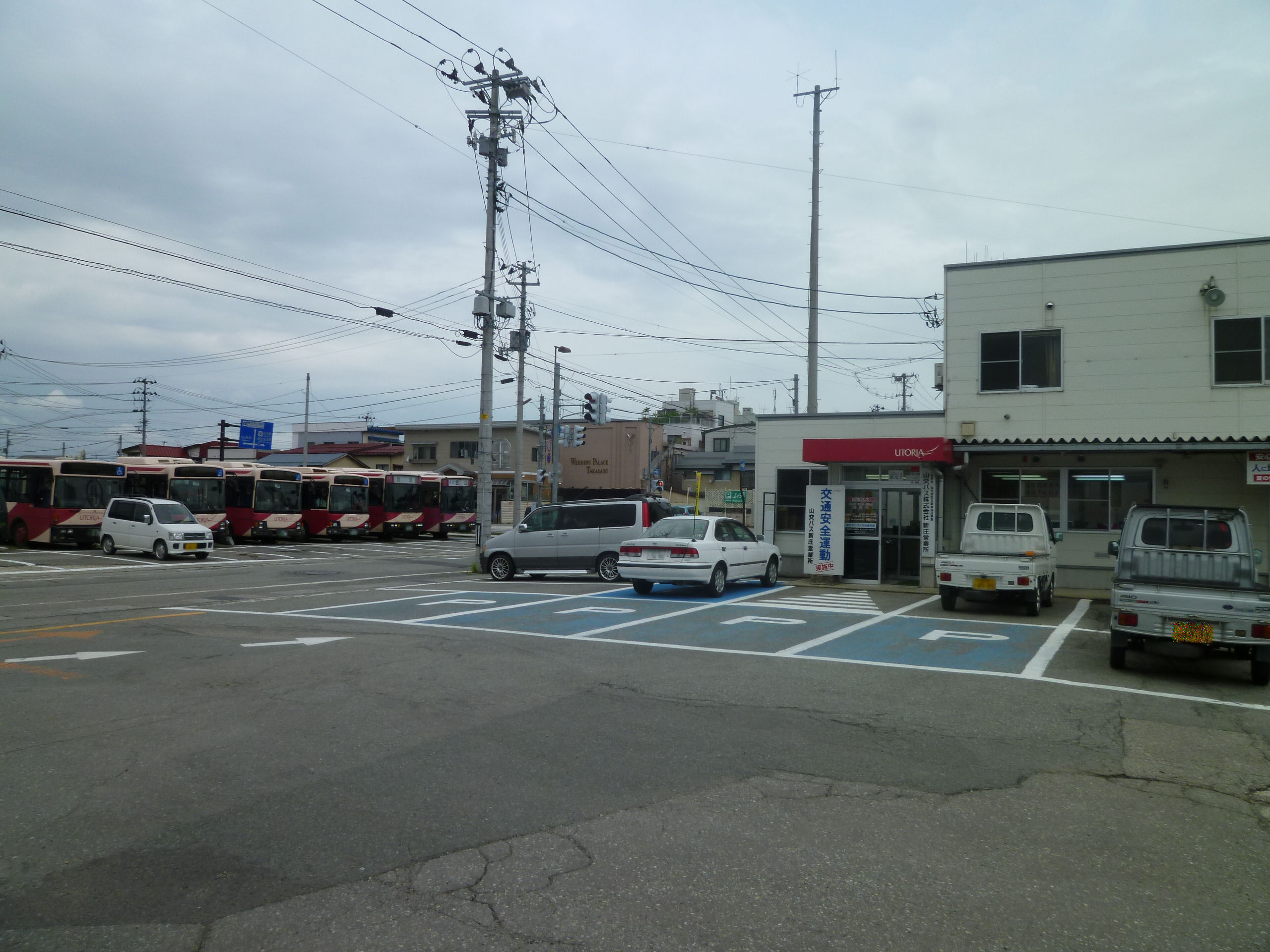 山交バス新庄営業所。 山形県新庄市若葉町に所在。